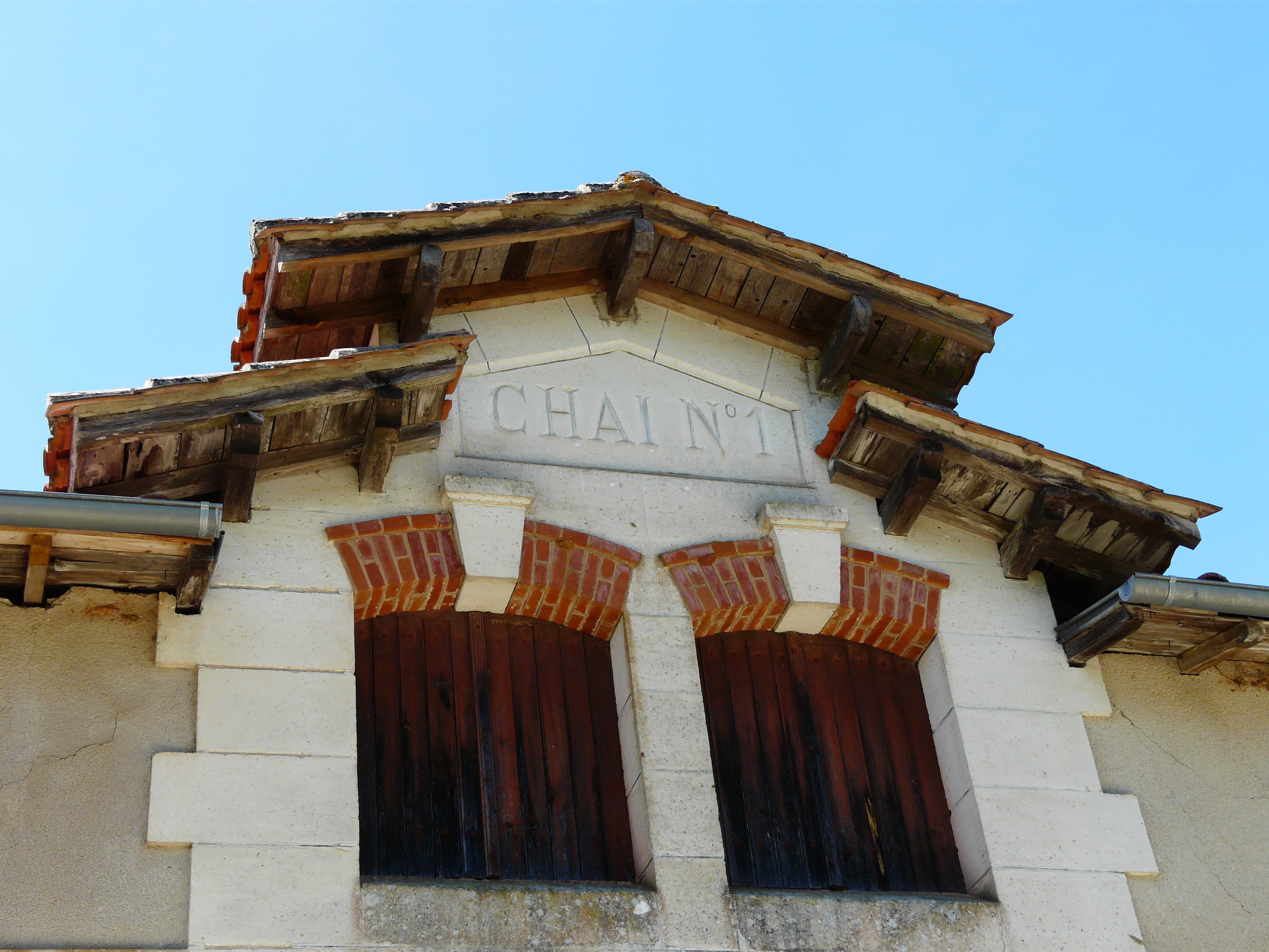 Détail du chai de Lardimalie, Saint-Pierre-de-Chignac, Dordogne, France.